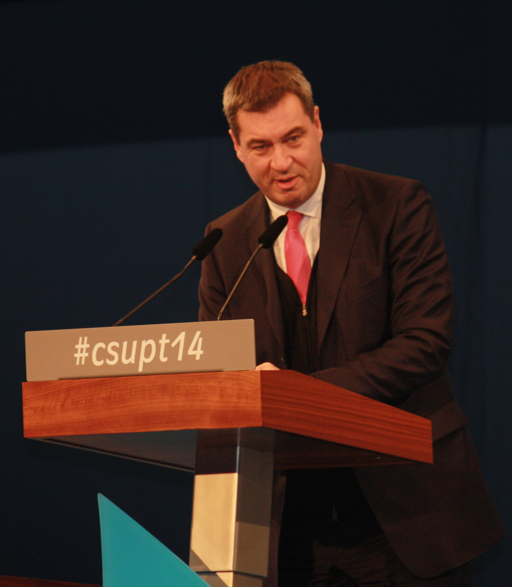 Markus Söder auf dem CSU-Parteitag am 12. Dezember 2014 in Nürnberg